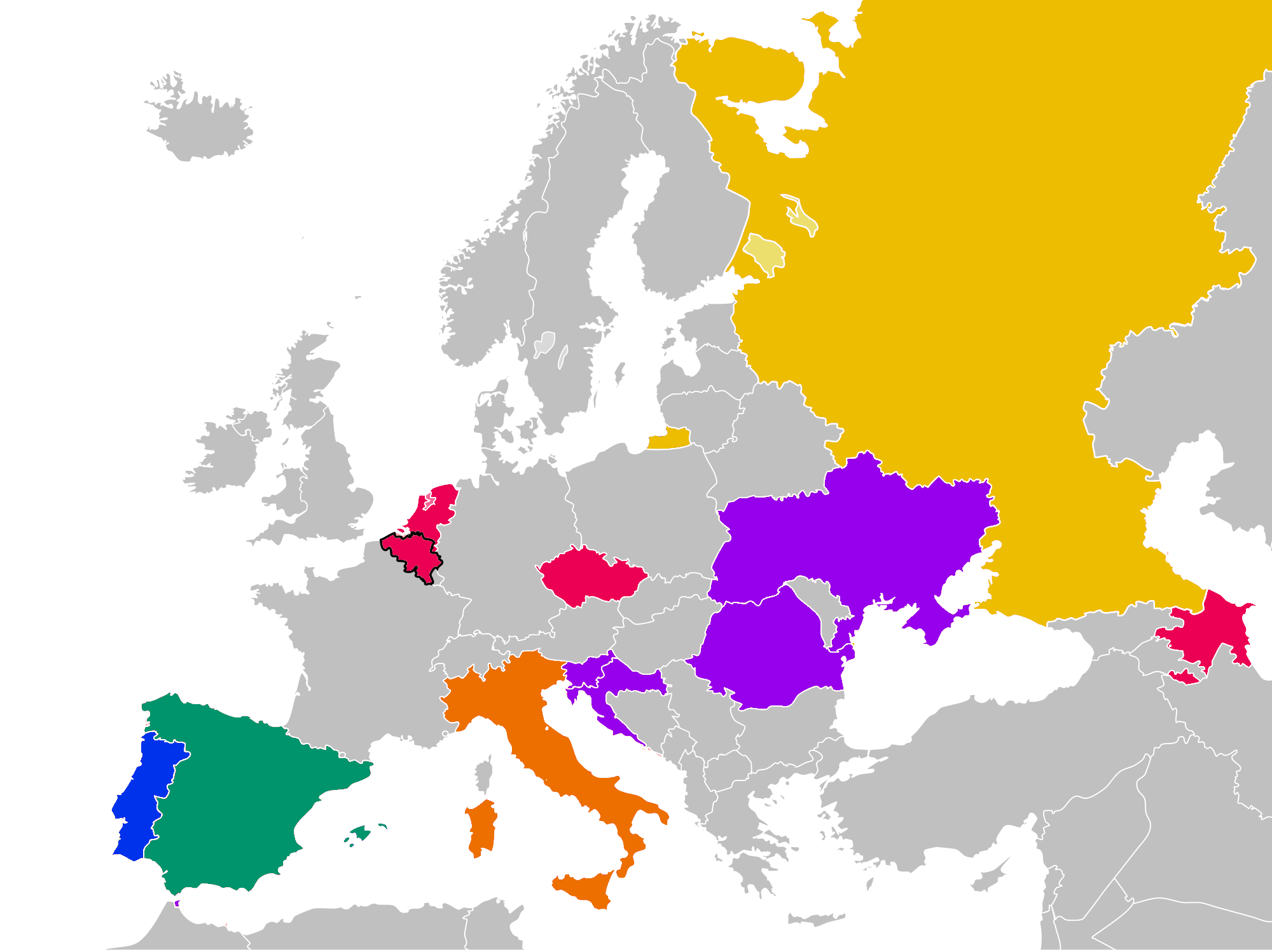 Équipes participantes de l'Euro 2014 (Belgique, Russie, Italie, Espagne, Ukraine, Portugal, Croatie, Roumanie, République tchèque, Azerbaïdjan, Slovénie et Pays-Bas). En rouge, les équipes non qualifiées pour les quarts-de-finale (premier tour). En violet, les équipes qualifiées pour les quarts-de-finale.